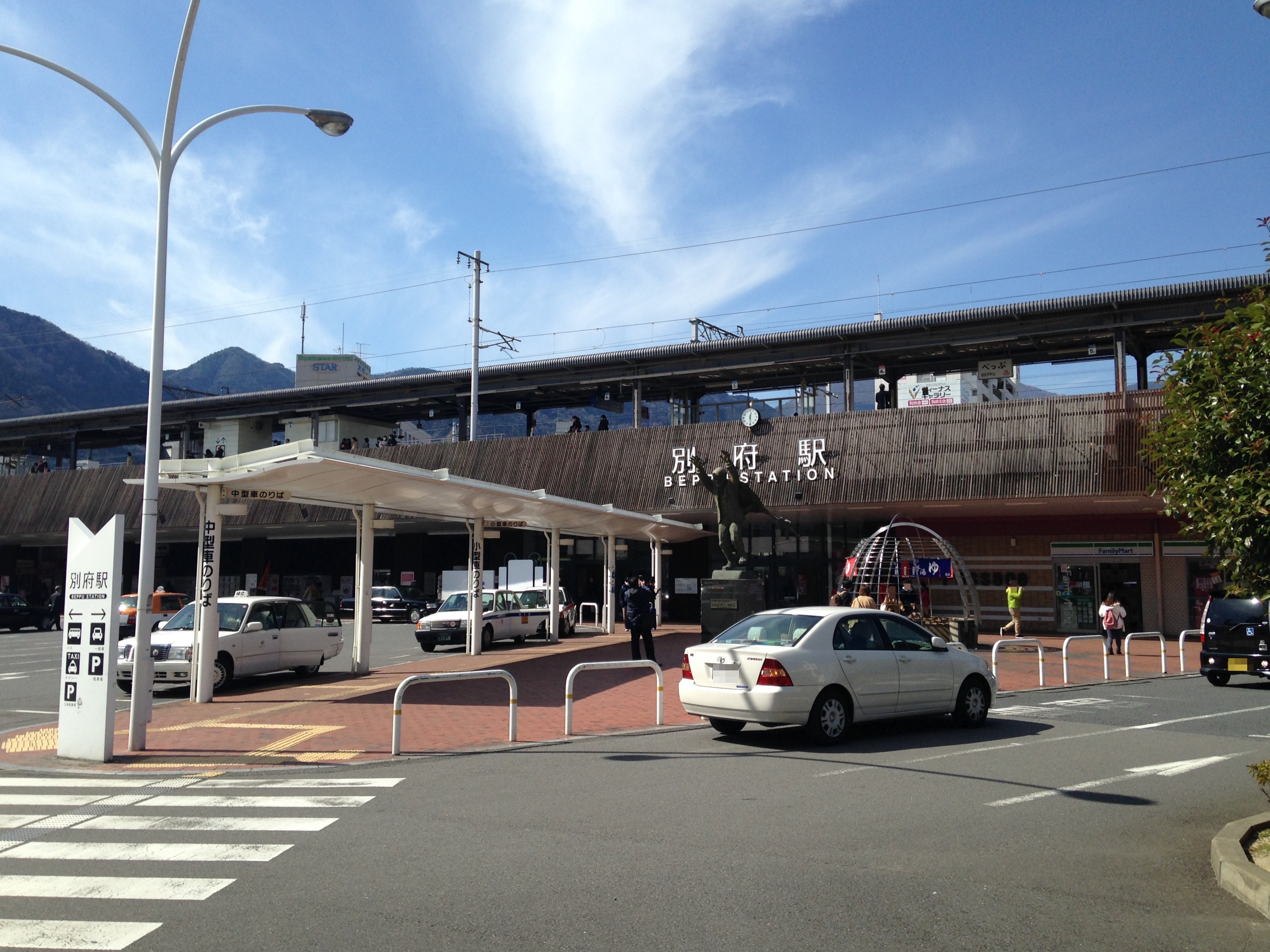 別府駅海岸口